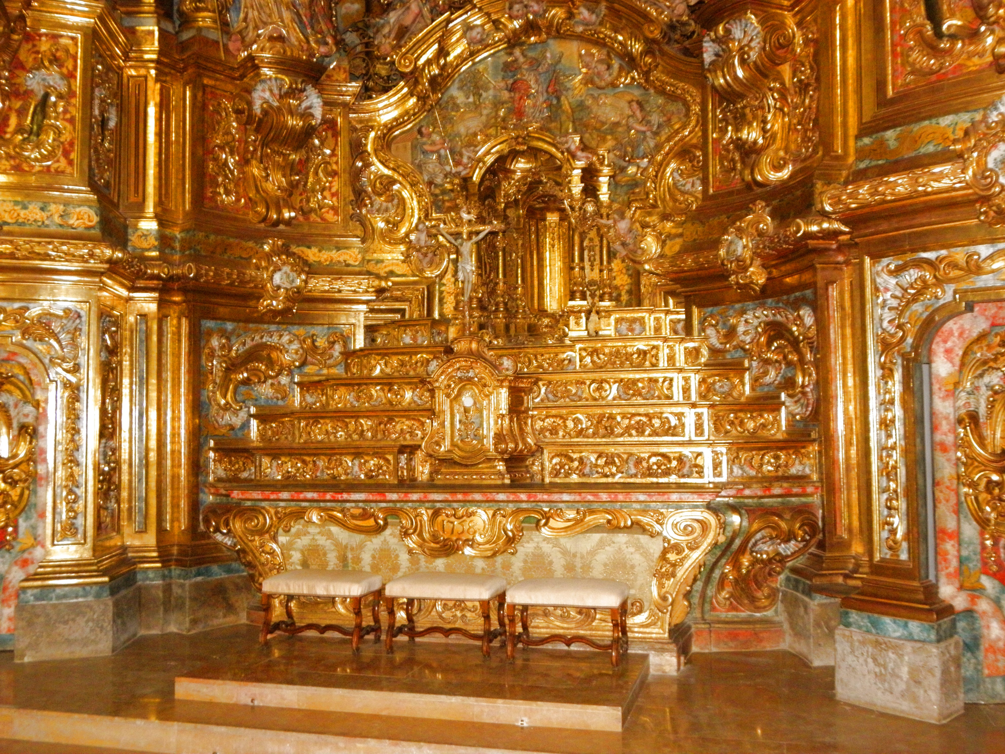 Retaule barroc del Miracle (Riner, Solsonès). L'altar, l'escalinata, els sagraris i el timpà.